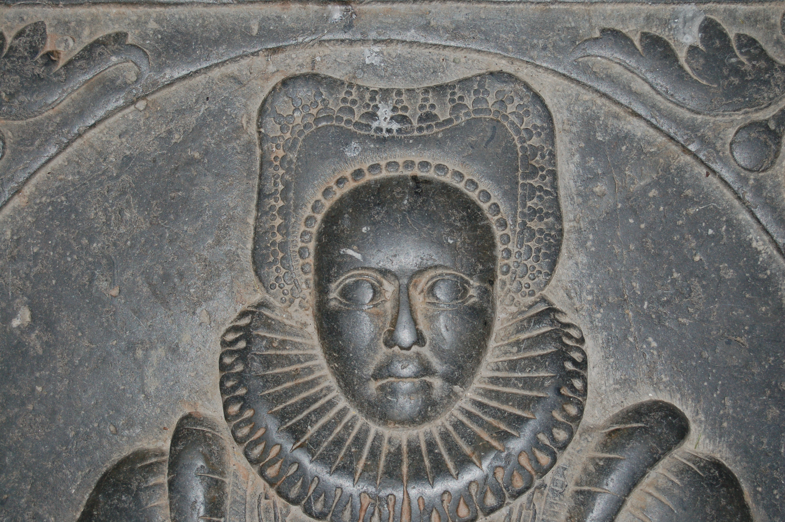 Ulvilde til Meløe gravstein Hedrum kirke